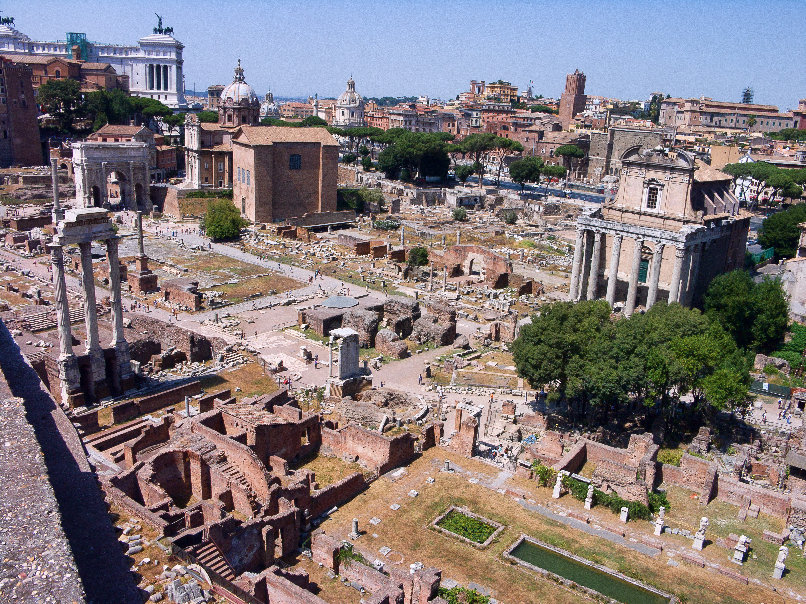 Vue du Forum Romanum à Rome